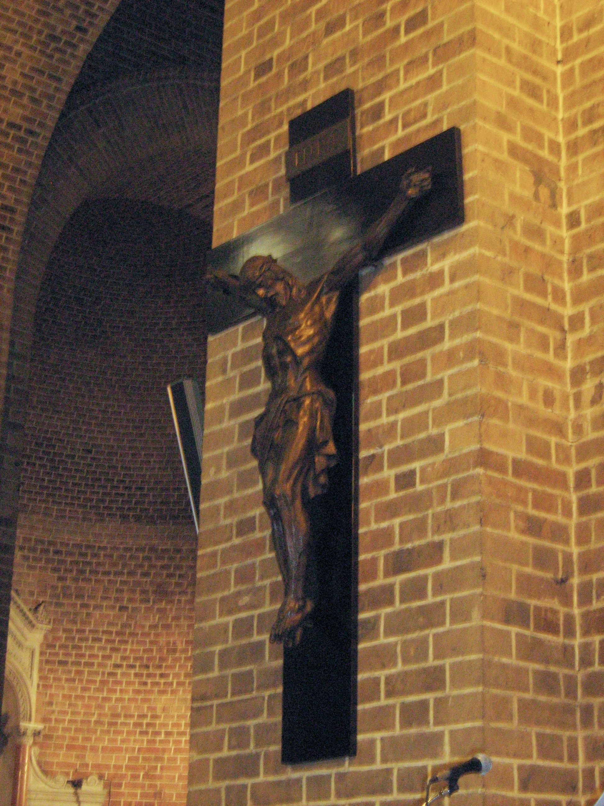 Jesús Crucificado obra de Bernardo Vieco Ortiz, ubicado ene la catedral Metropolitana de Medellín, Colombia